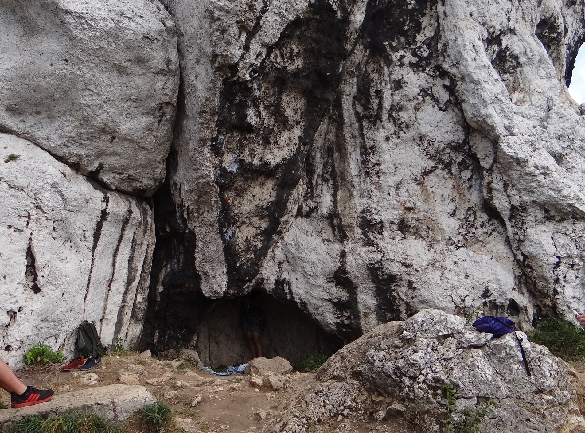 Komin w Studnisku Rzędkowickim